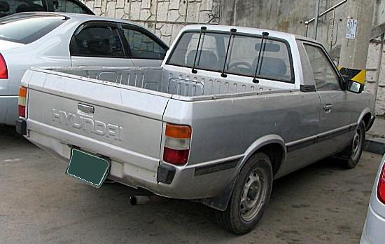 Hyundai Pony Pickup